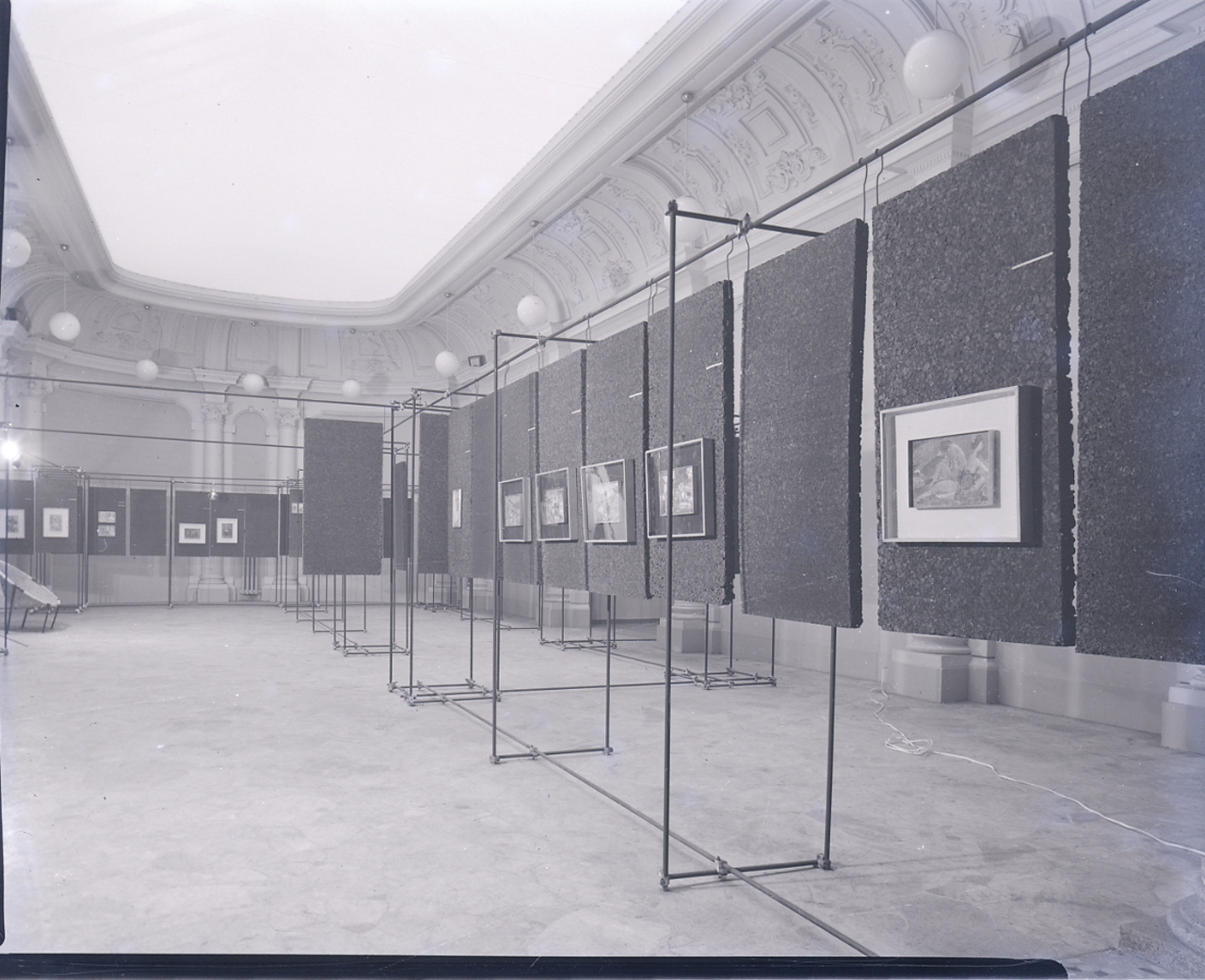 Servizio fotografico : Milano, 1963 / Paolo Monti. - Buste: 16, Fototipi: 20 : Negativo b/n, gelatina bromuro d'argento/ pellicola ; 10x12. - ((Serie costituita da 16 buste di negativi identificati con i nn.: 3310, 3311, 3312, 3313, 3314, 3315, 3316, 3317, 3318, 3319, 3320, 3321, 3322, 3323, 3324, 3325, 3326, 3327, 3328, 3329, e tenute insieme da una graffetta. - Su ritaglio di stampa fotografica iscrizione didascalica manoscritta a penna al verso. - Le buste sono numerate da 1 a 15. - Sul coperchio della scatola e sulla rubrica citata nelle fonti (in corrispondenza della serie) iscrizione didascalica manoscritta: "Arch. Viganò". - Fonte: Rubrica di Paolo Monti: Archivio 10x12 (ultimi numerati) - dal G1 al (s.d.), presso Archivio Paolo Monti